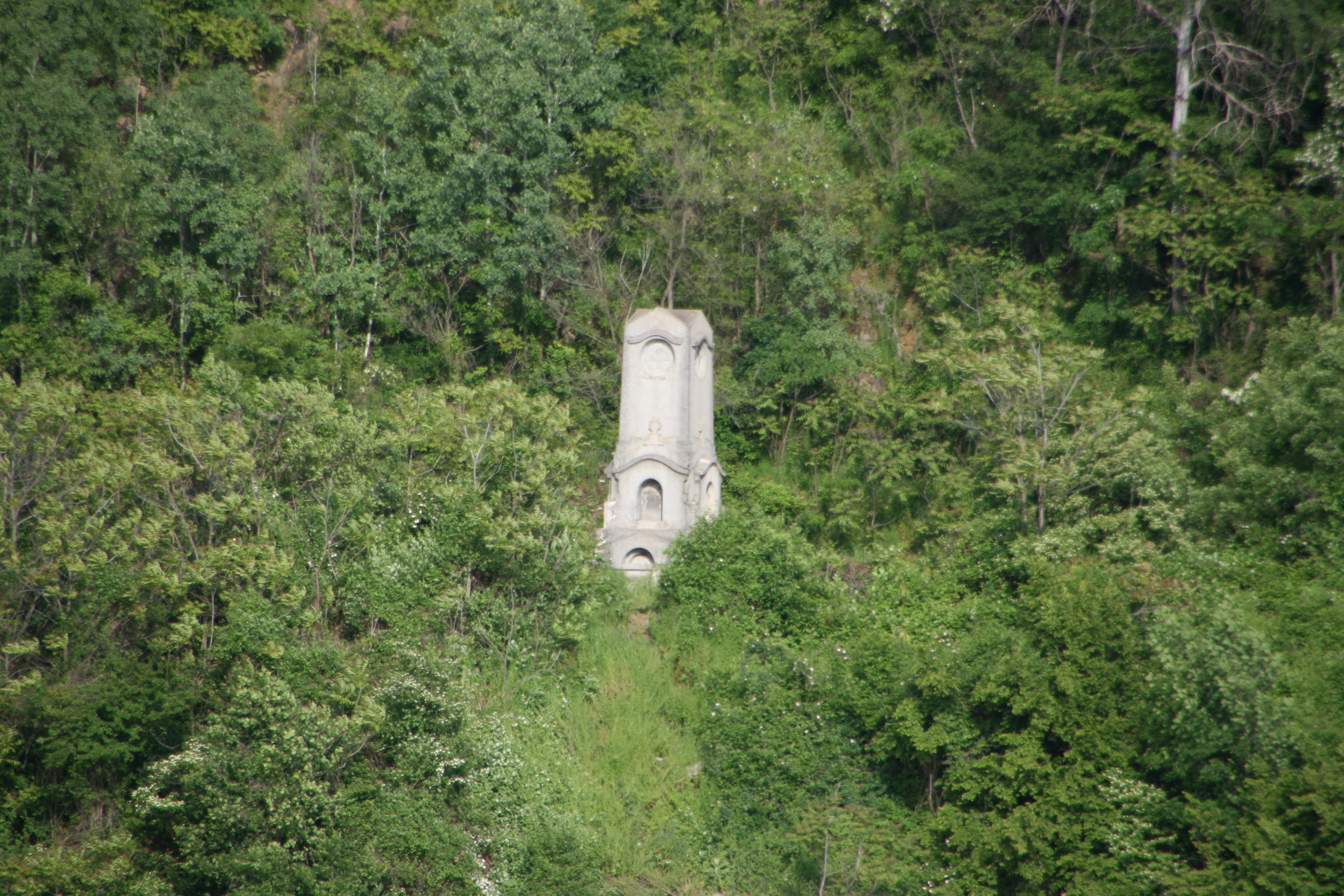 Wurde von den Türken 1788 enthauptet, weil er als Haüptmann an der Seite der Österreicher gekämpft hatte.